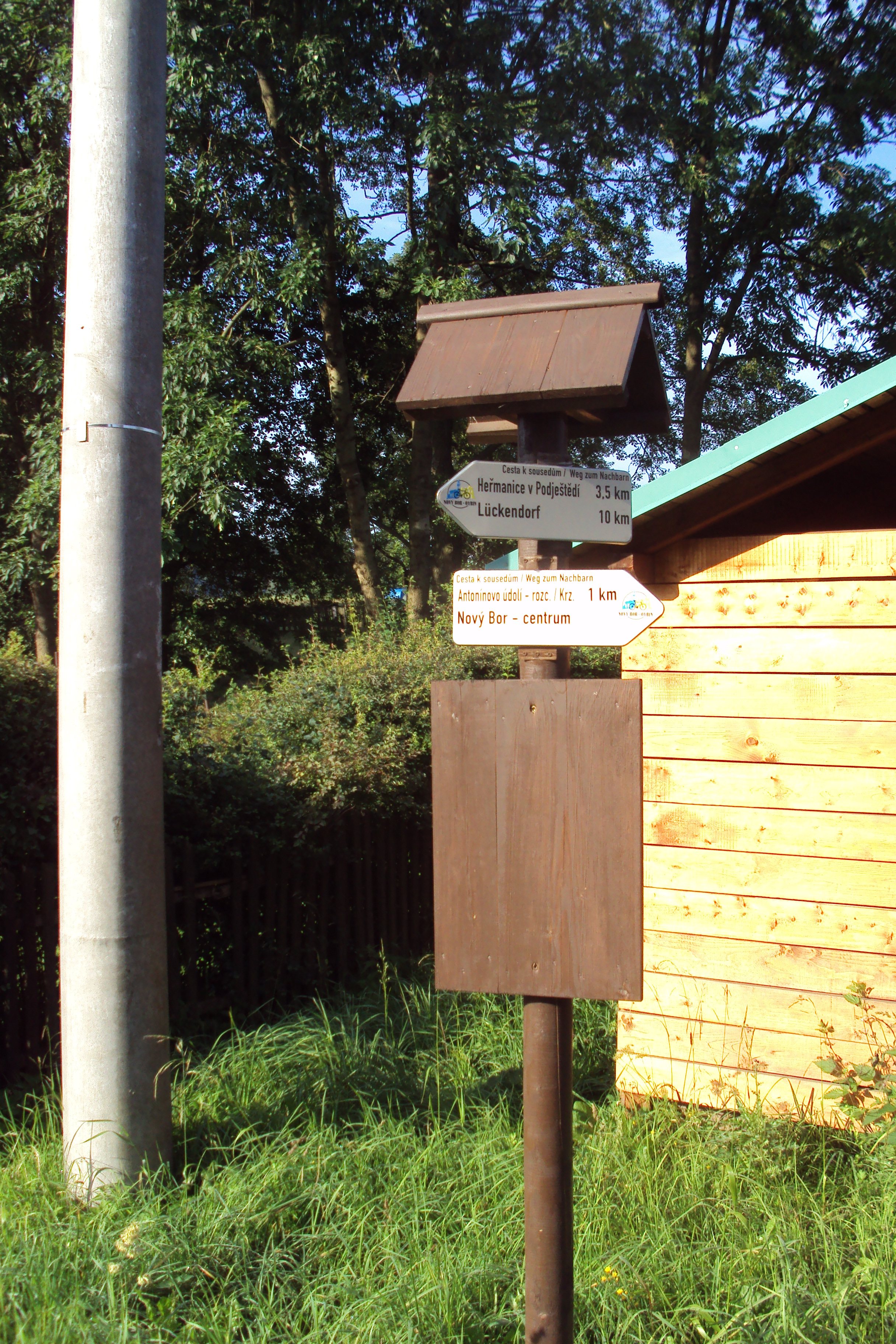 Atypické česko-německé rozcestníky v Lužických horách, tento je v Mařenicích